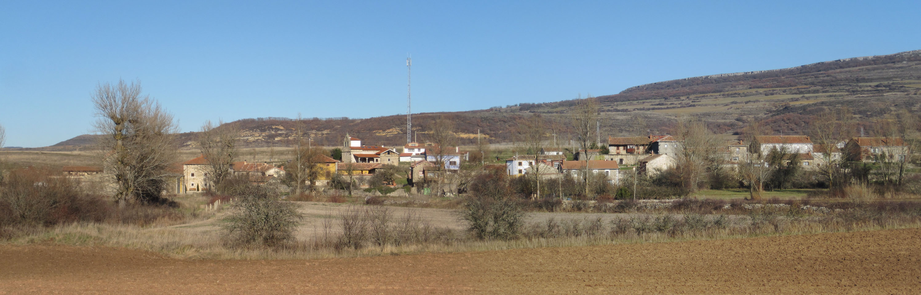 Vista panorámica de Puentetoma (Aguilar de Campoo, Palencia, España).